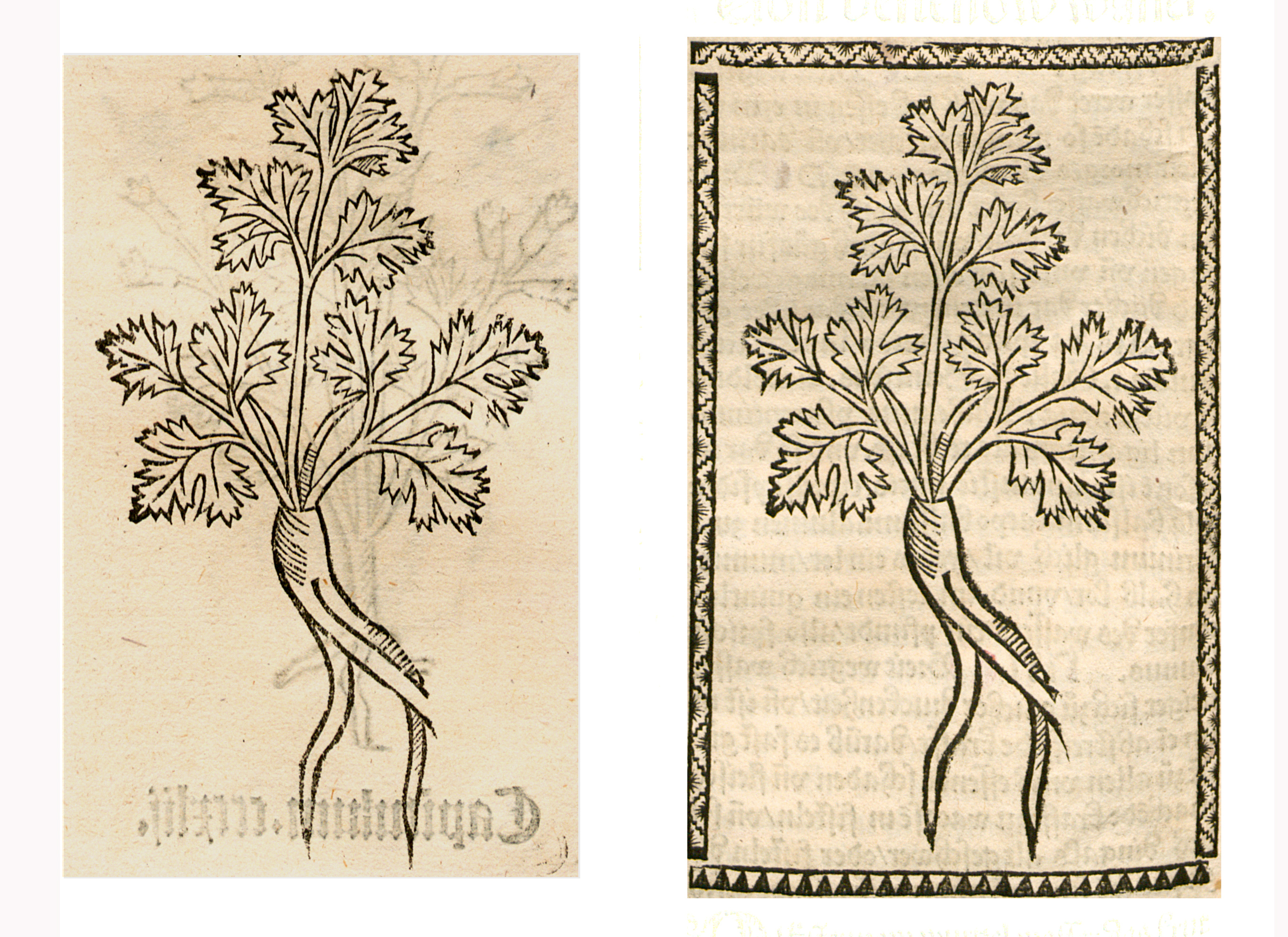 Abbildung von: Pastinaken